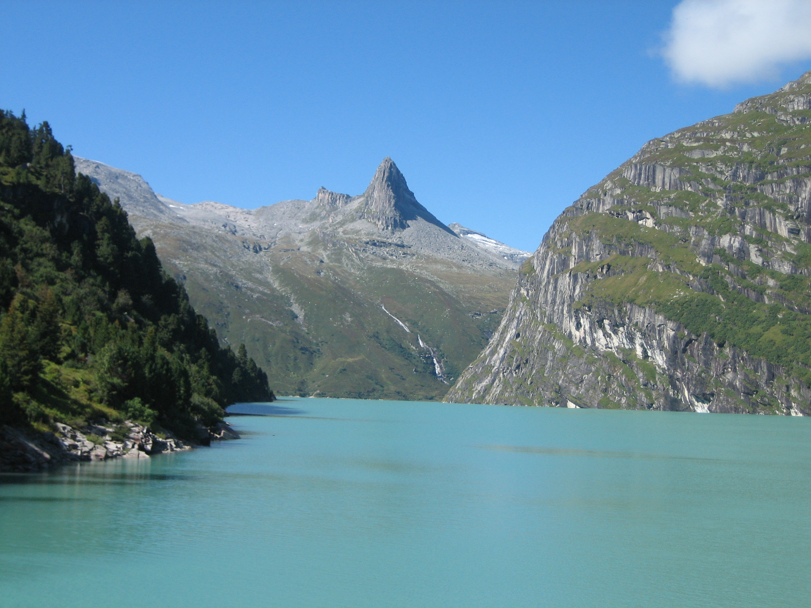 Zervreilasee, Zevreilahorn